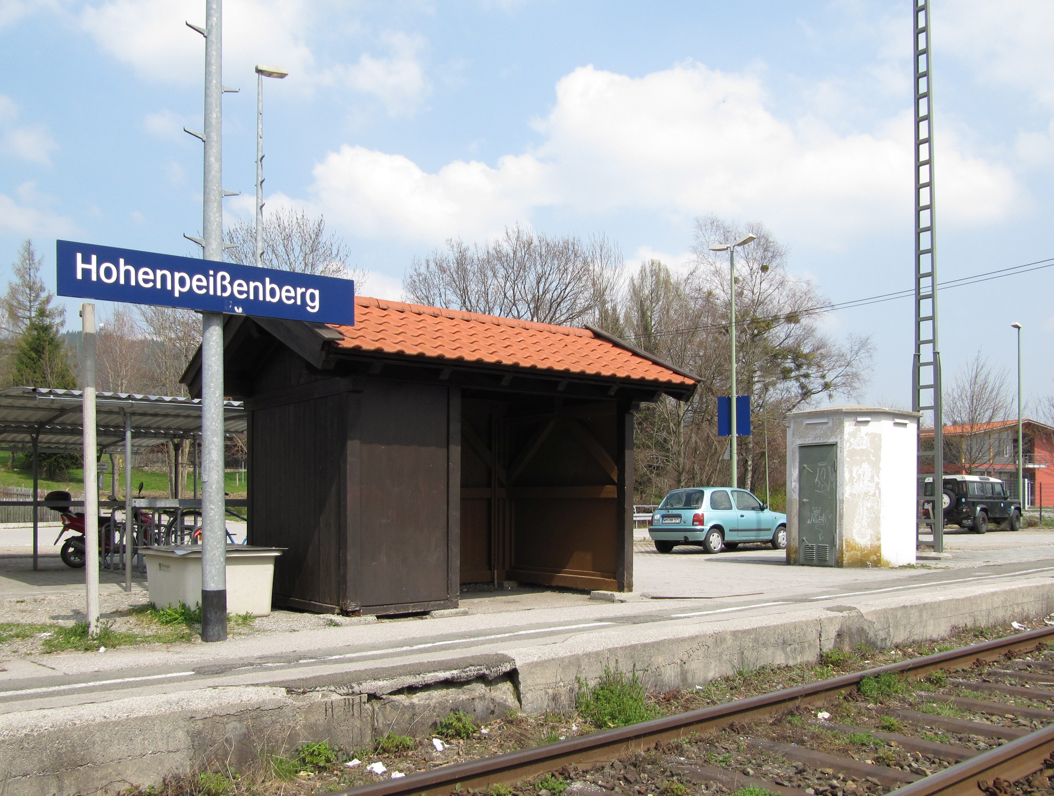 Bahnstation Hohenpeißenberg von Süd